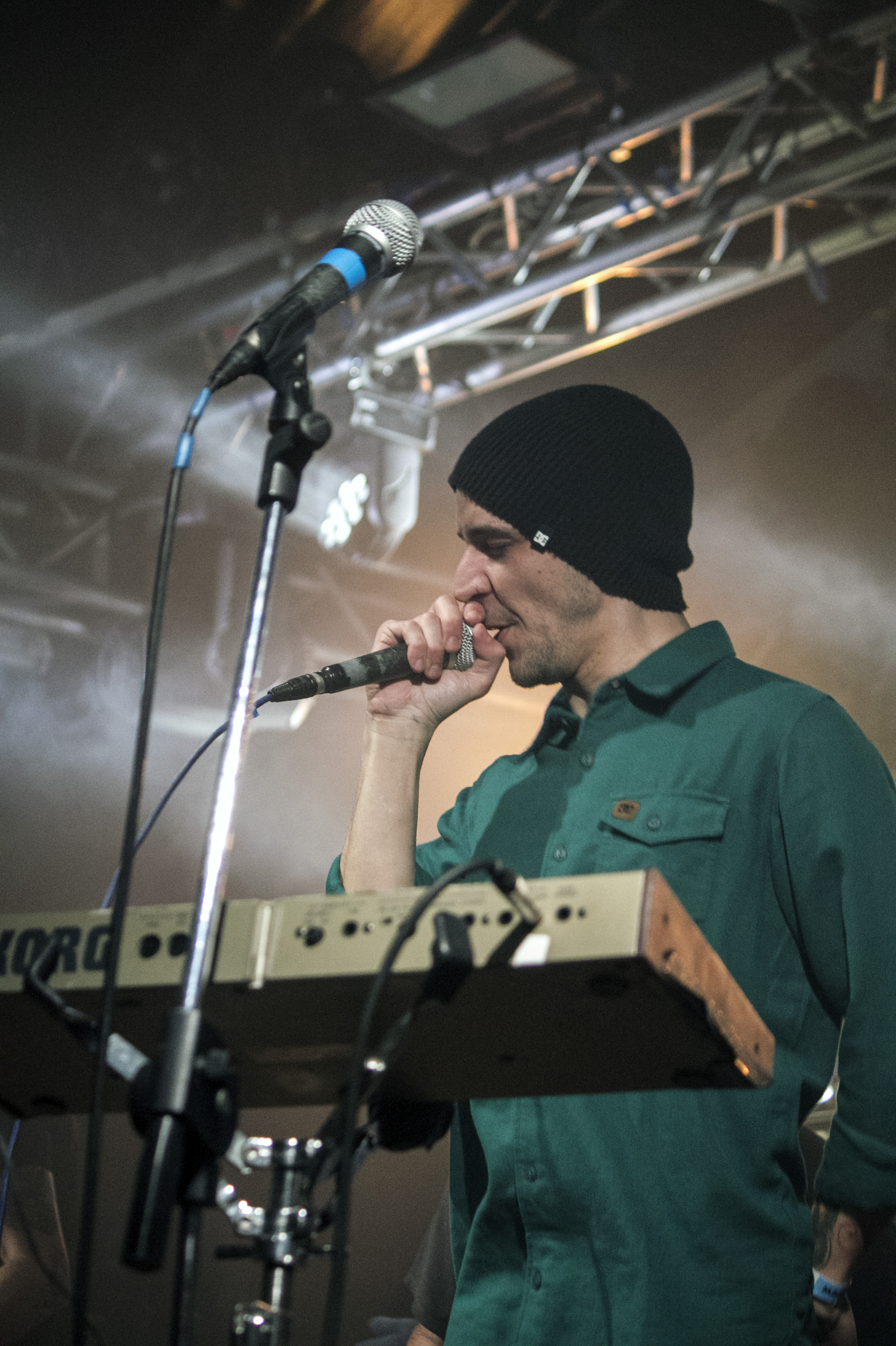 Dade (Segrate, Circolo Magnolia)